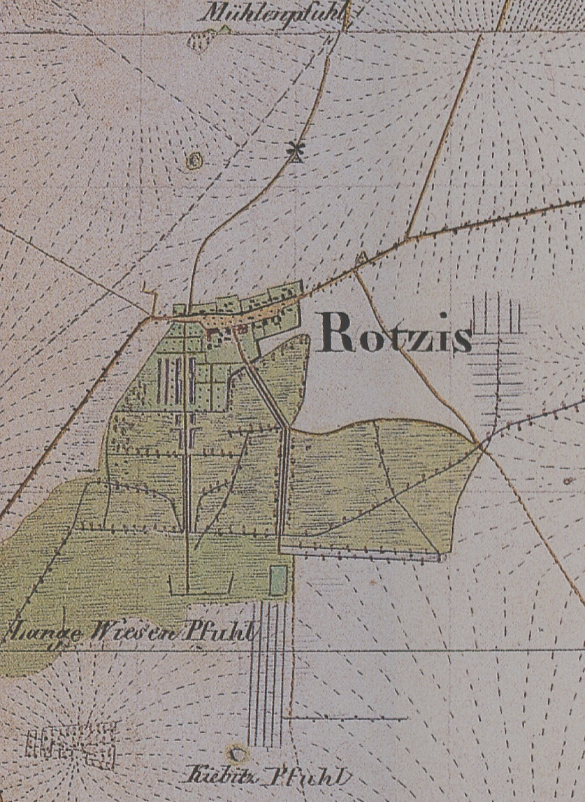 Rotberg/Rotzis auf dem Urmesstischblatt 3647 Zeuthen von 1839, Gemeinde Schönefeld, Landkreis Dahme-Spreewald, Brandenburg